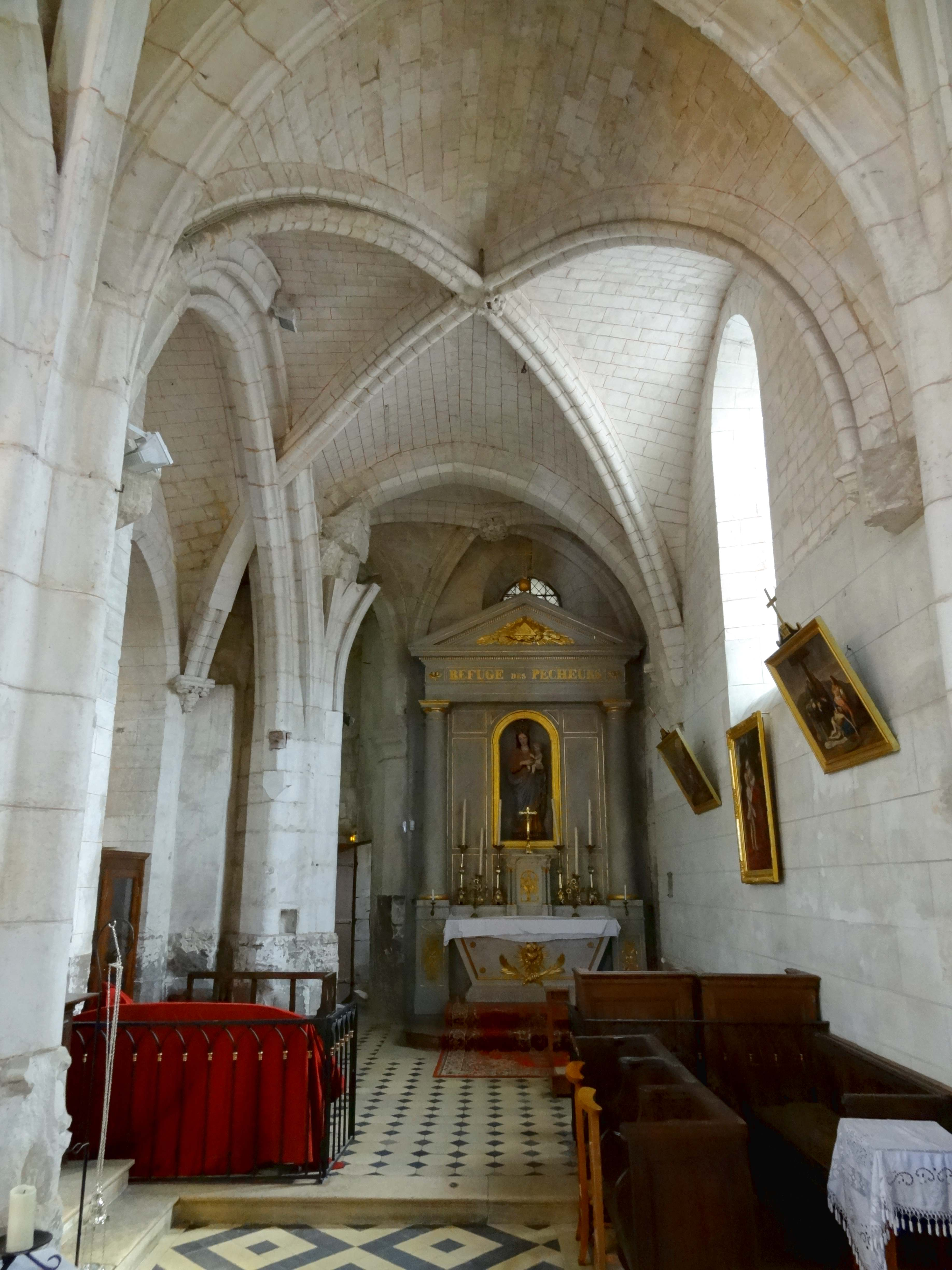 Intérieur de l'église - voir titre.